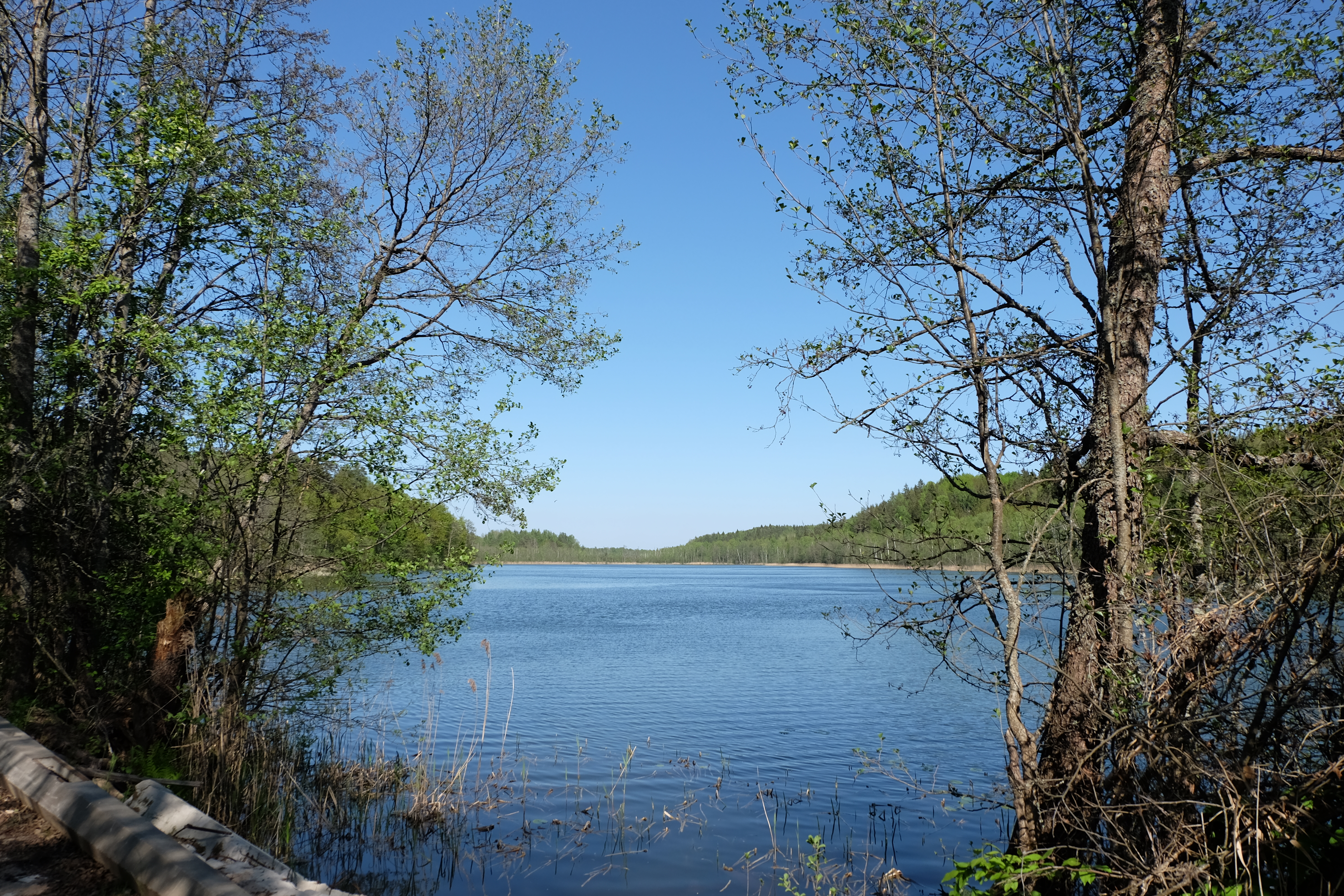 Деревня Затуленье. Озеро. 2016 г.